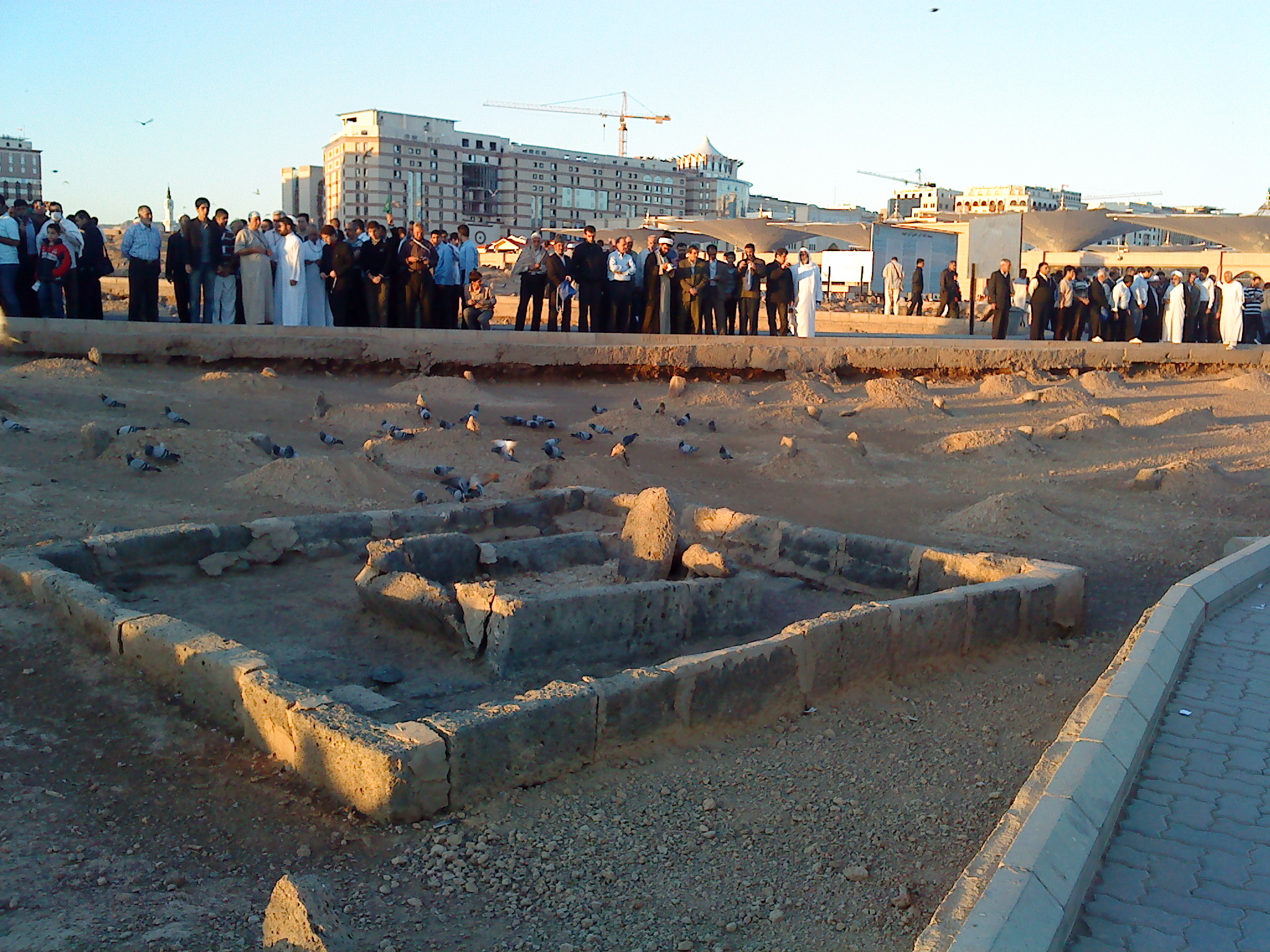 জান্নাত-উল-বাকী, মদিনায় হযরত ইব্রাহিম এর কবর